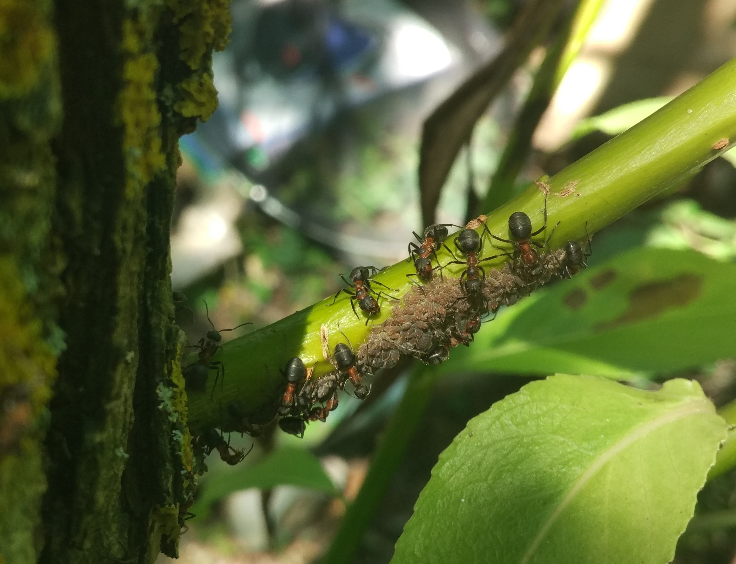 formica rufa попелиці